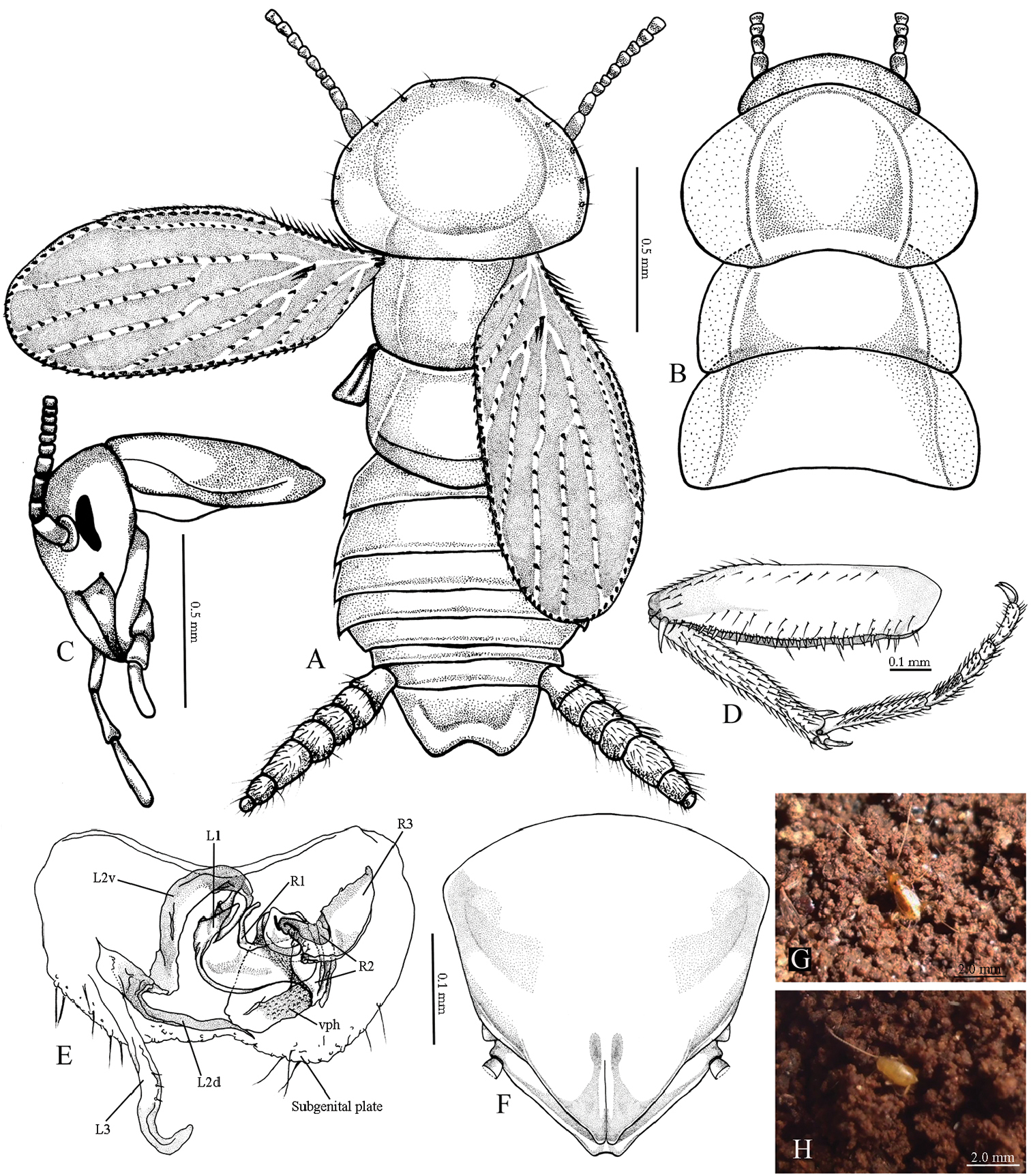 Figure 1; Nocticola gonzalezi Lucañas & Lit, sp. n.: A Adult male B adult female C male head, lateral aspect D Prothoracic leg E male genitalia: (L1-3: sclerites of left phallomere; L2d: L2 dorsal; L2v: L2 ventral; R1-3: sclerites of right phallomere; vph: ventral phallomere) F female subgenital plate G male and H female habitus.